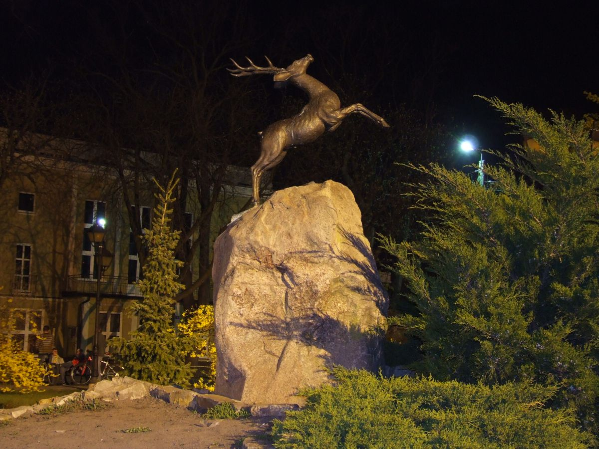 Kozienice, Poland, rynek - kamień z godłem miasta